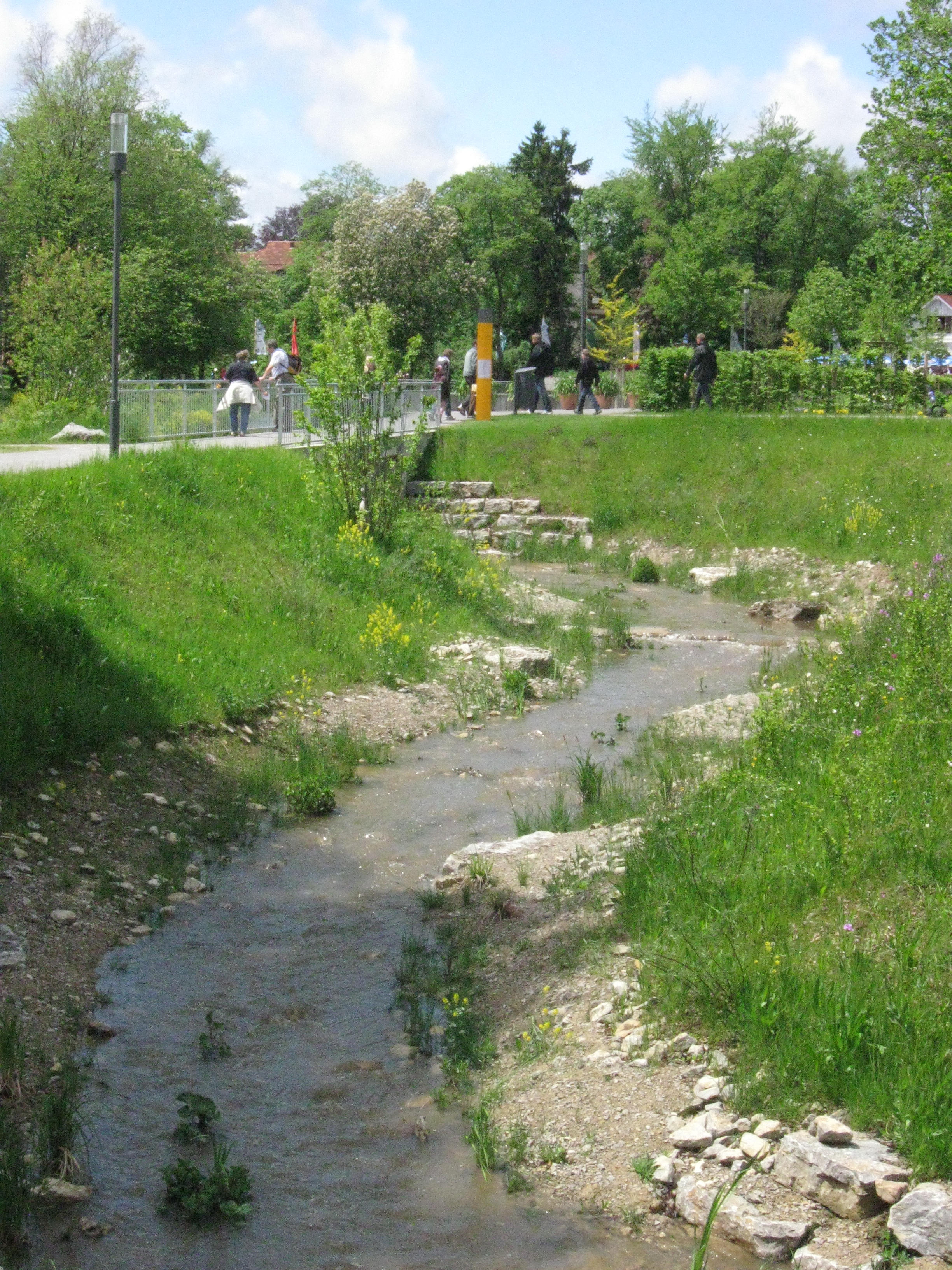 neu gestaltetes Bett des Neckars auf dem Landesgartenschaugelände